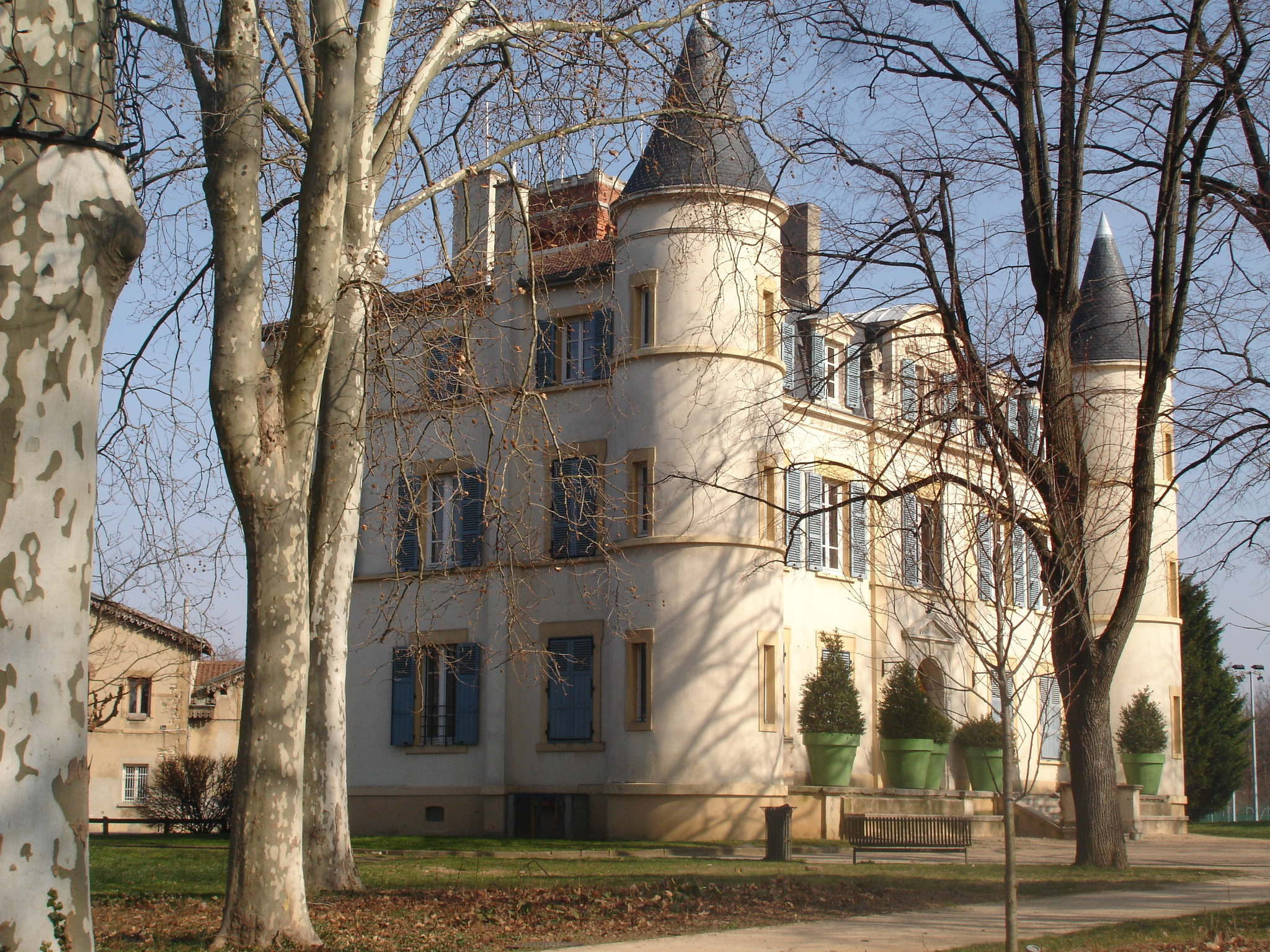 Feyzin (69) : le "château"